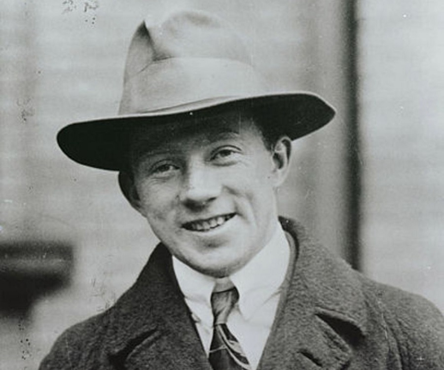 Werner Heisenberg